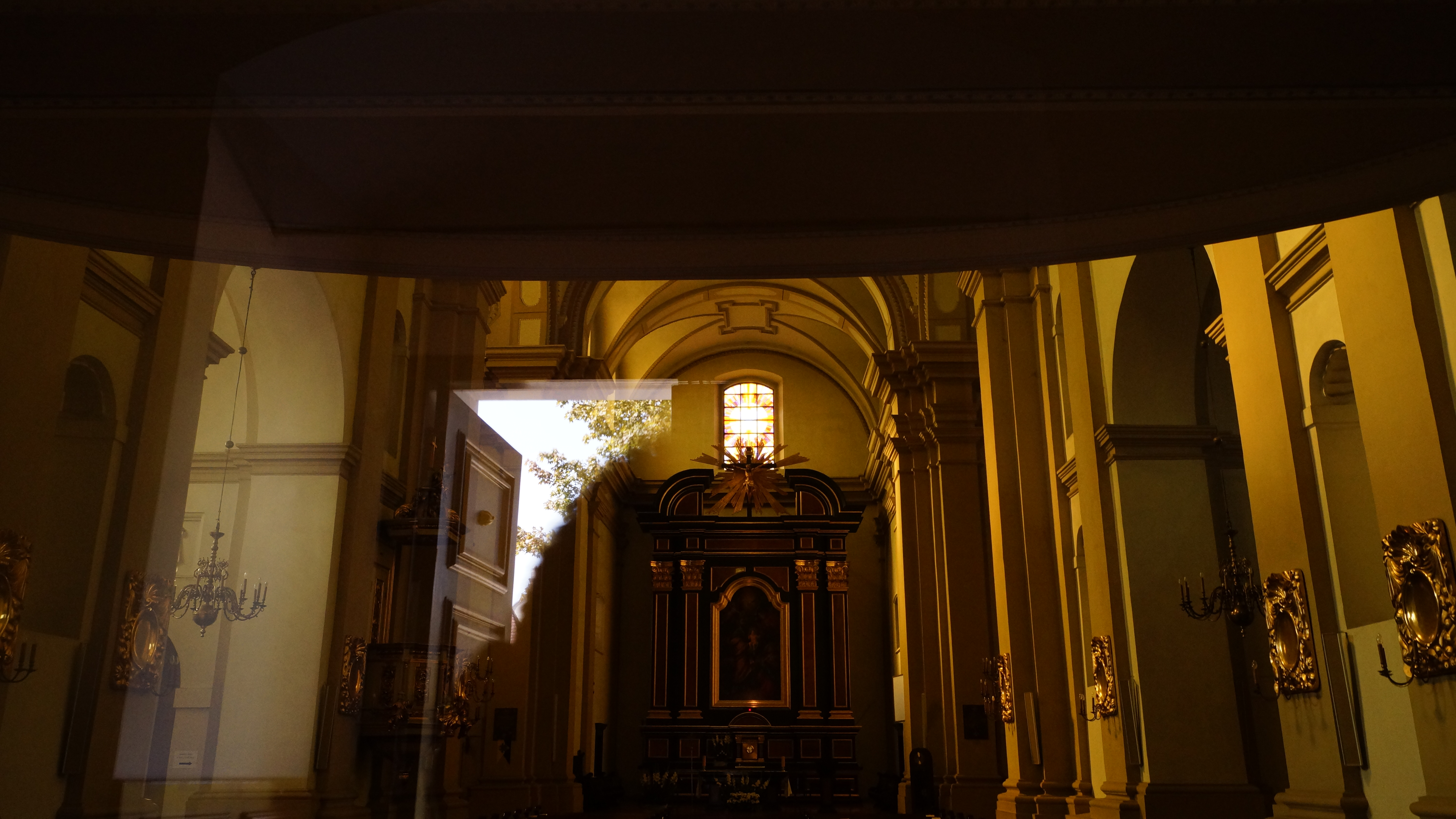 Poznań - pl. Działowy 2 - kościół karmelitów bosych pw. św. Józefa (zabytek nr A-159)